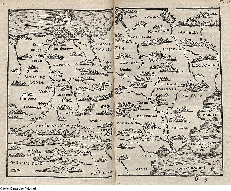 Original image description from the Deutsche Fotothek Geographie & Karte